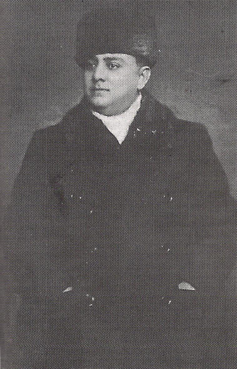 Grigoras Dinicu